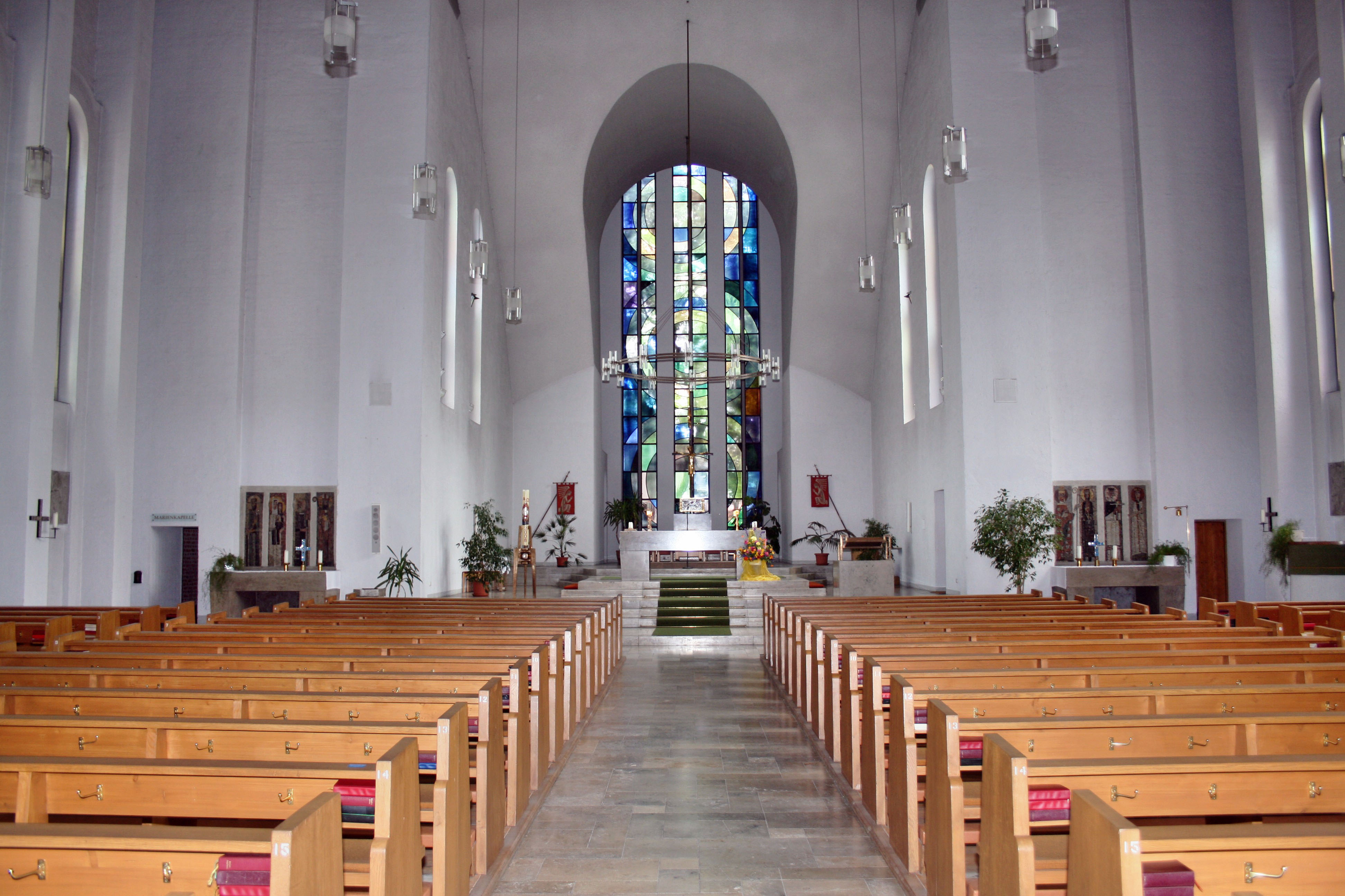 Ansicht des Kirchenschiffs, Mariä Himmelfahrt